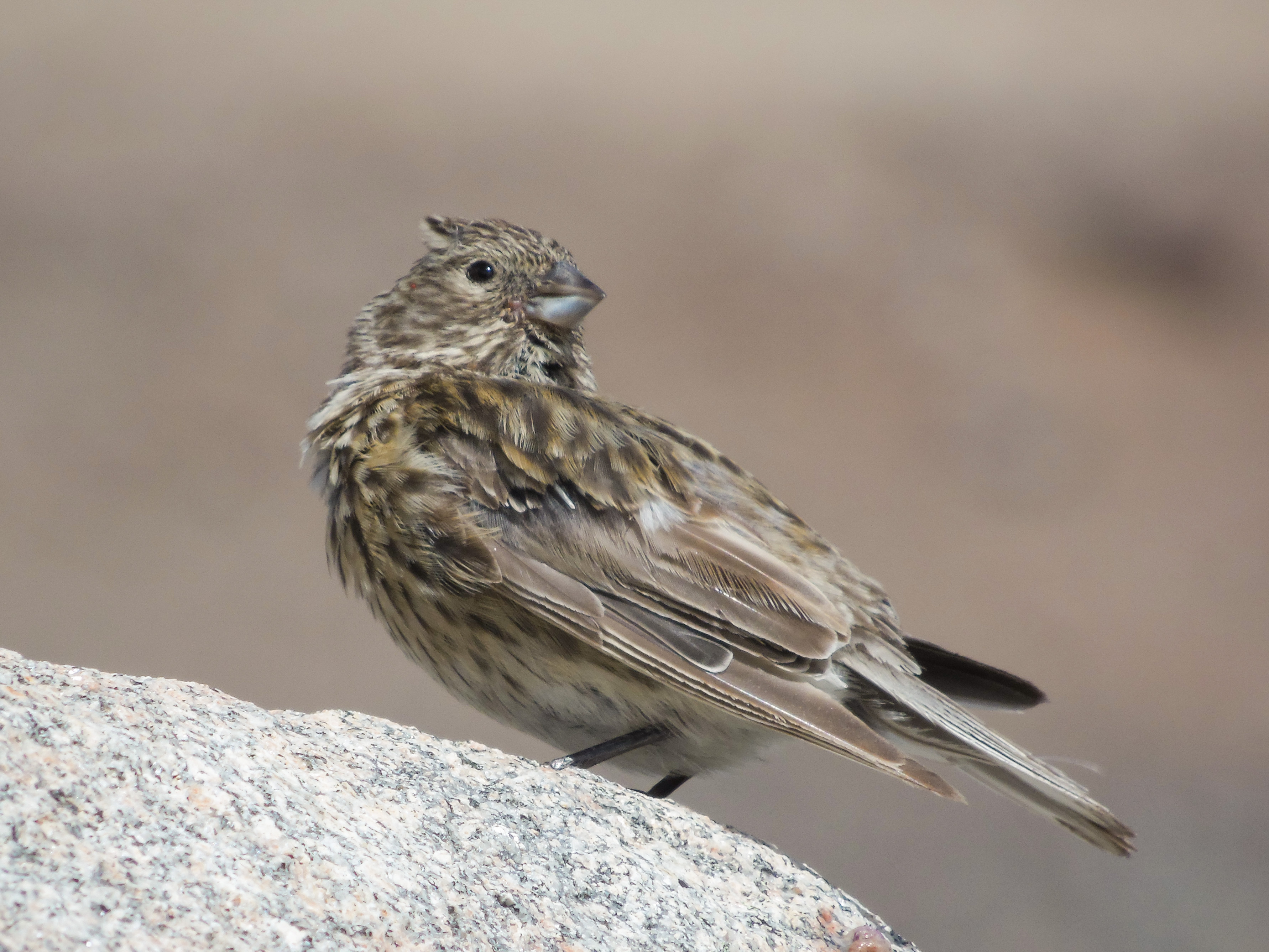 Yal Cordillerano Juvenil (Melanodera xanthogramma) Parque Nacional Cerro Castillo. Región de Aysén, Chile.